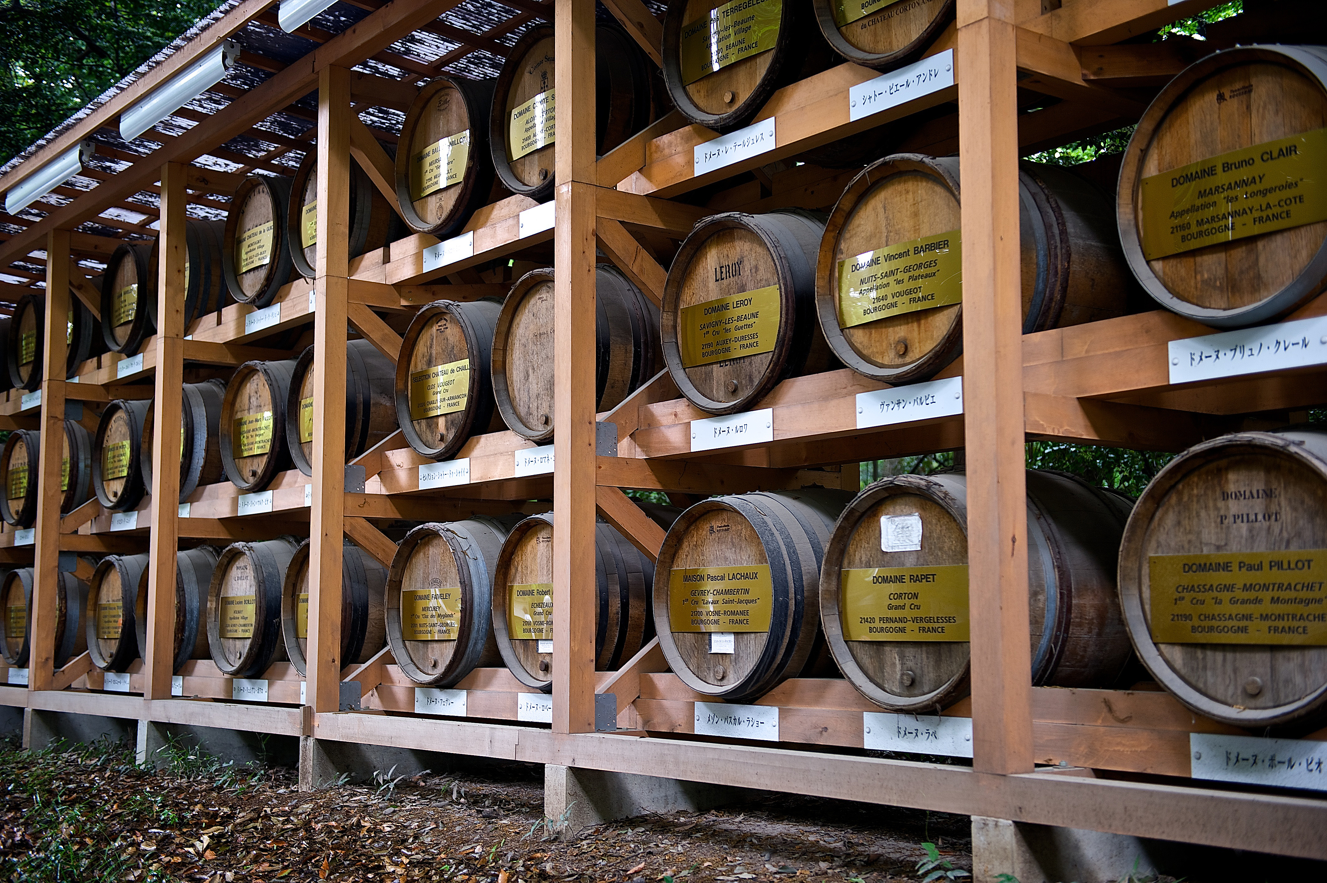 Stockage de vins de Bourgogne chez un négociant de Tokyo